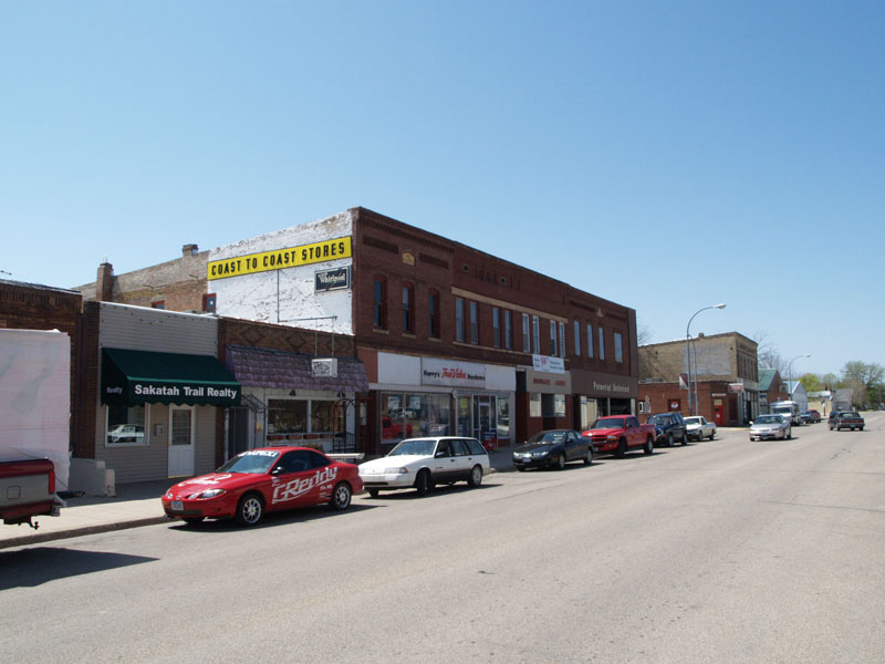 Waterville, Minnesota. From .